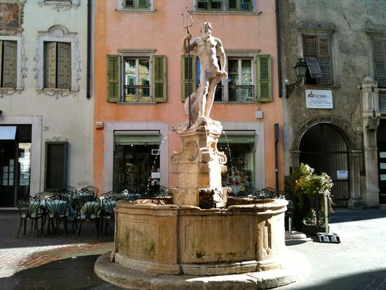 Rovereto, Fontana del Nettuno